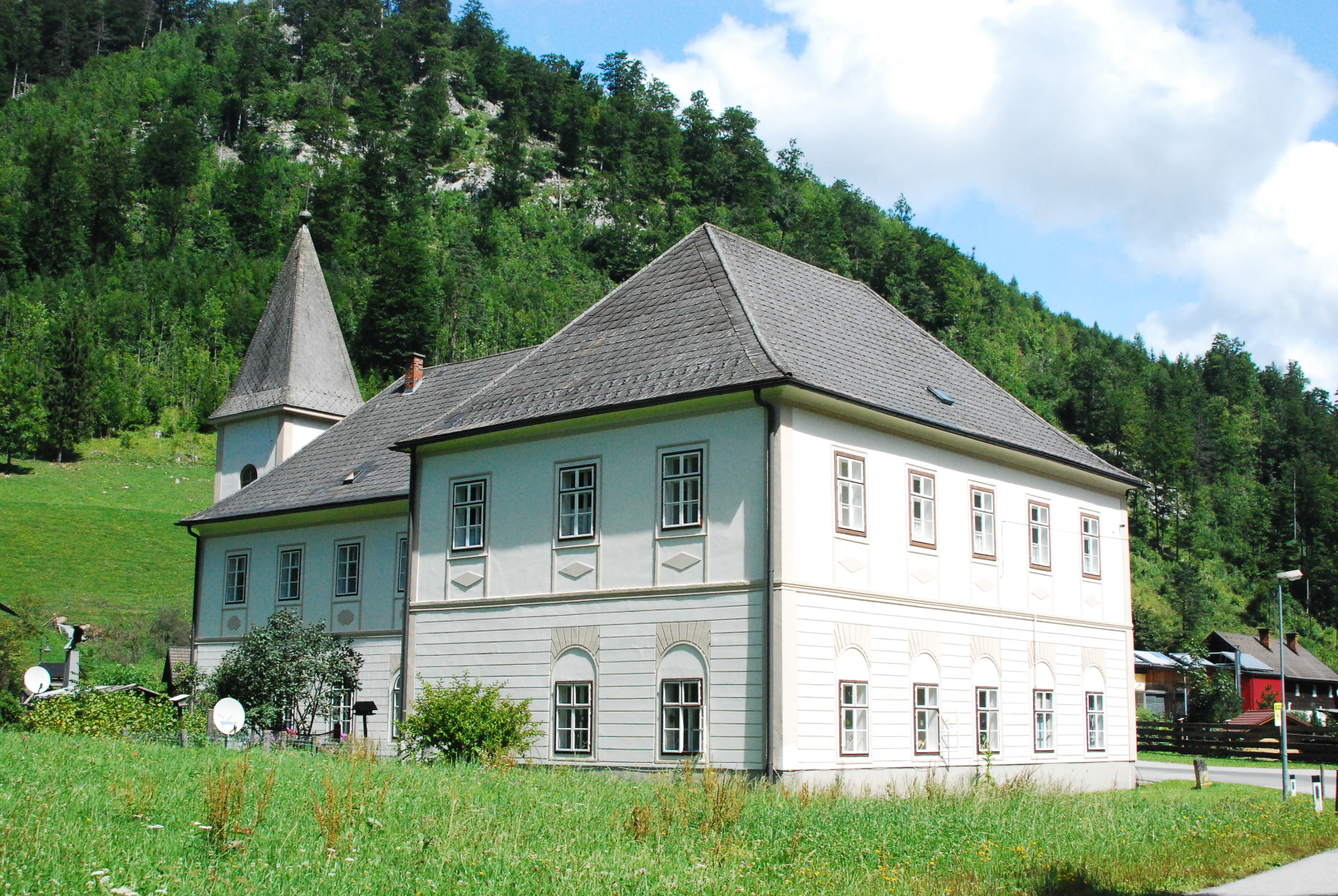 Die evangelische Pfarrkirche von Naßwald in Niederösterreich.